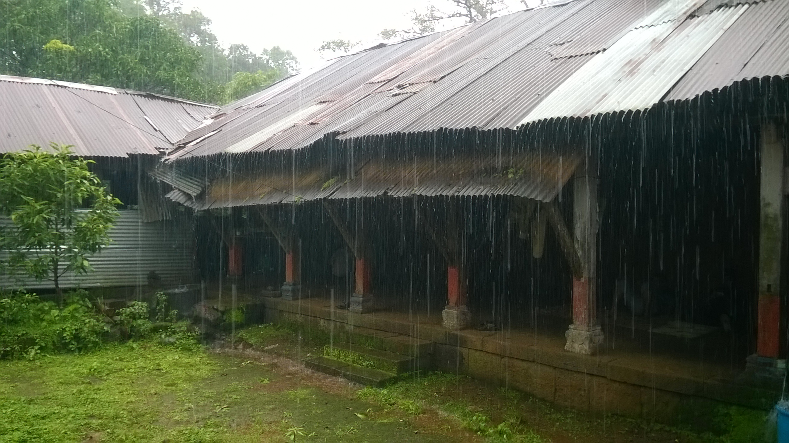 Pantsachiv Wada in Rains